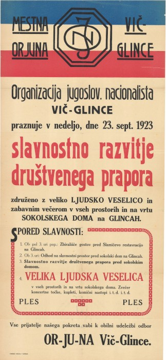 Plakat Organizacija jugoslov. nacionalista Vič-Glince praznuje v nedeljo, dne 23. sept. 1923 slavnostno razvitje društvenega prapor